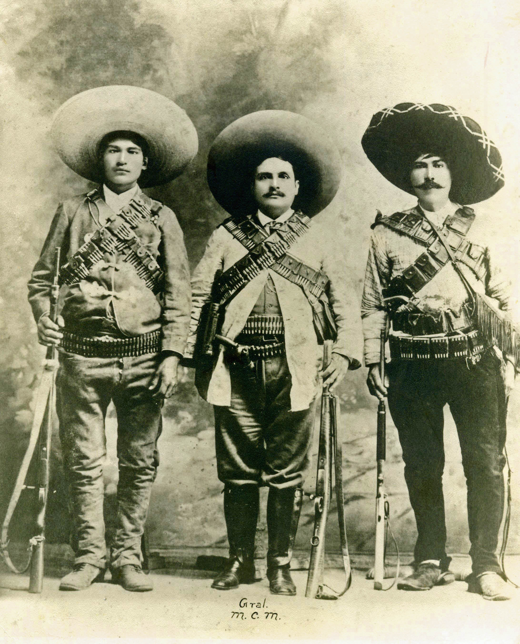 Fotografia del Gral. Miguel C. Martinez y sus subordinados en campaña